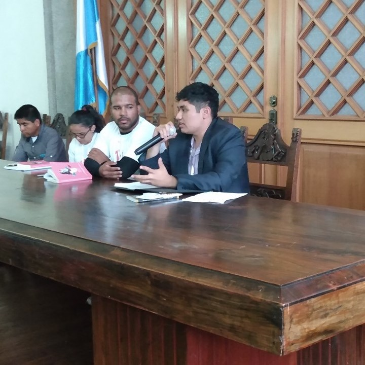 Alejandro Rejon en el Festival Internacional de Poesía de Quetzaltenango,Guatemala.